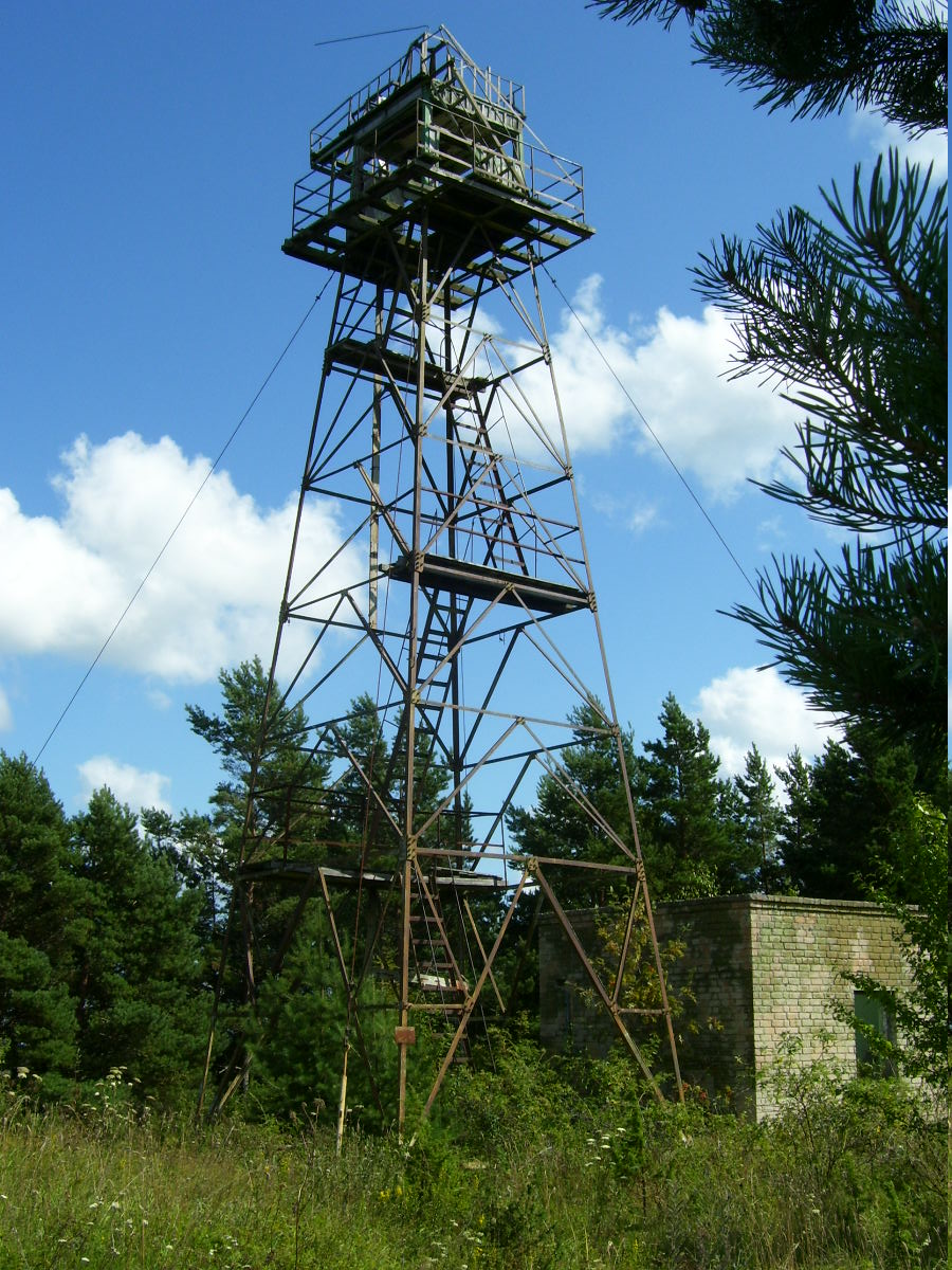 Vana vahitorn Sääre ninas (Suuresadama küla, Hiiumaa)